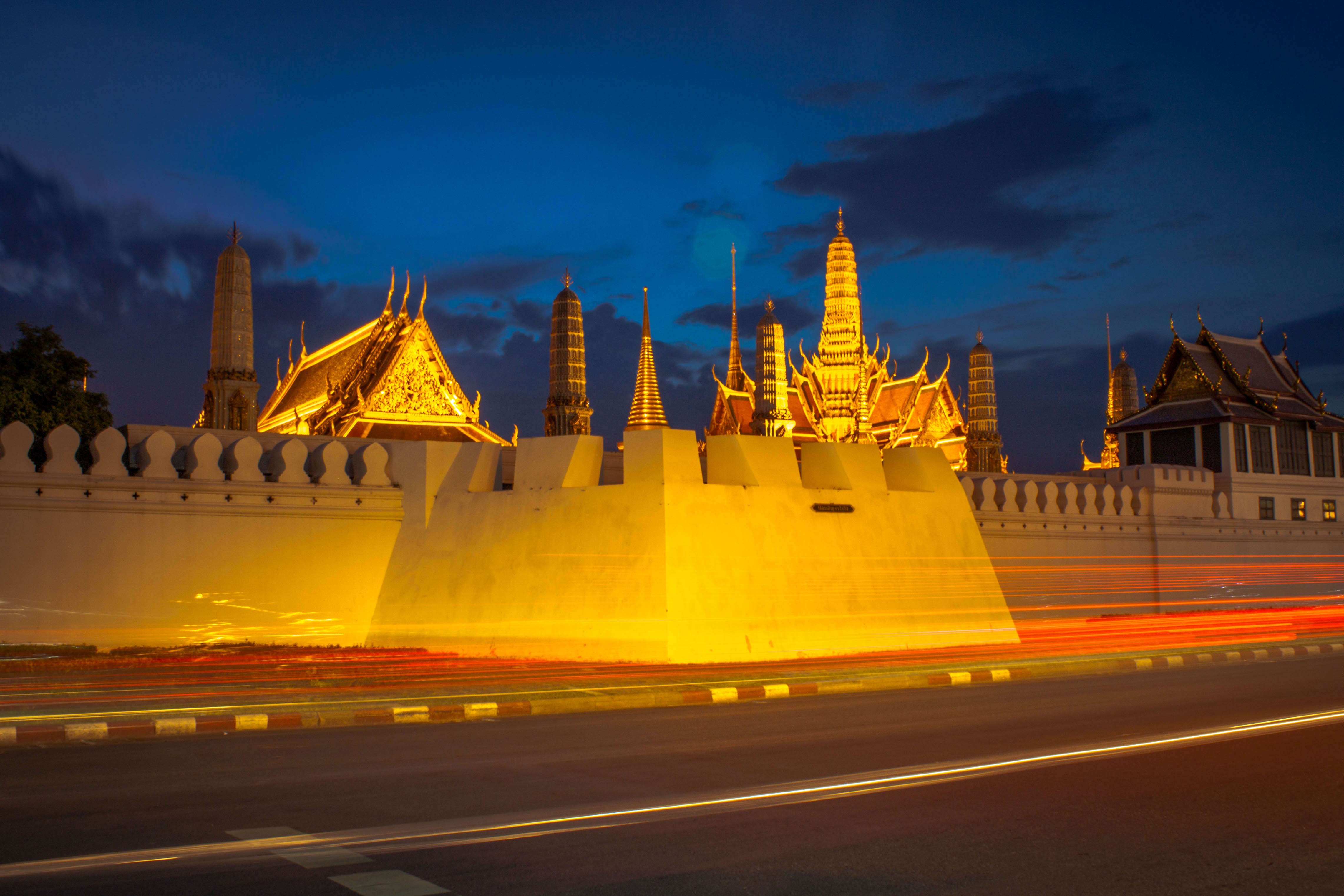 พระบรมมหาราชวัง ถ.หน้าพระลาน เขตพระนคร กรุงเทพมหานคร